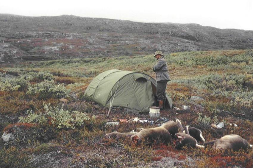 Reindeer hunt, Ilulialik, in inner Godthåbsfjord, Greenland